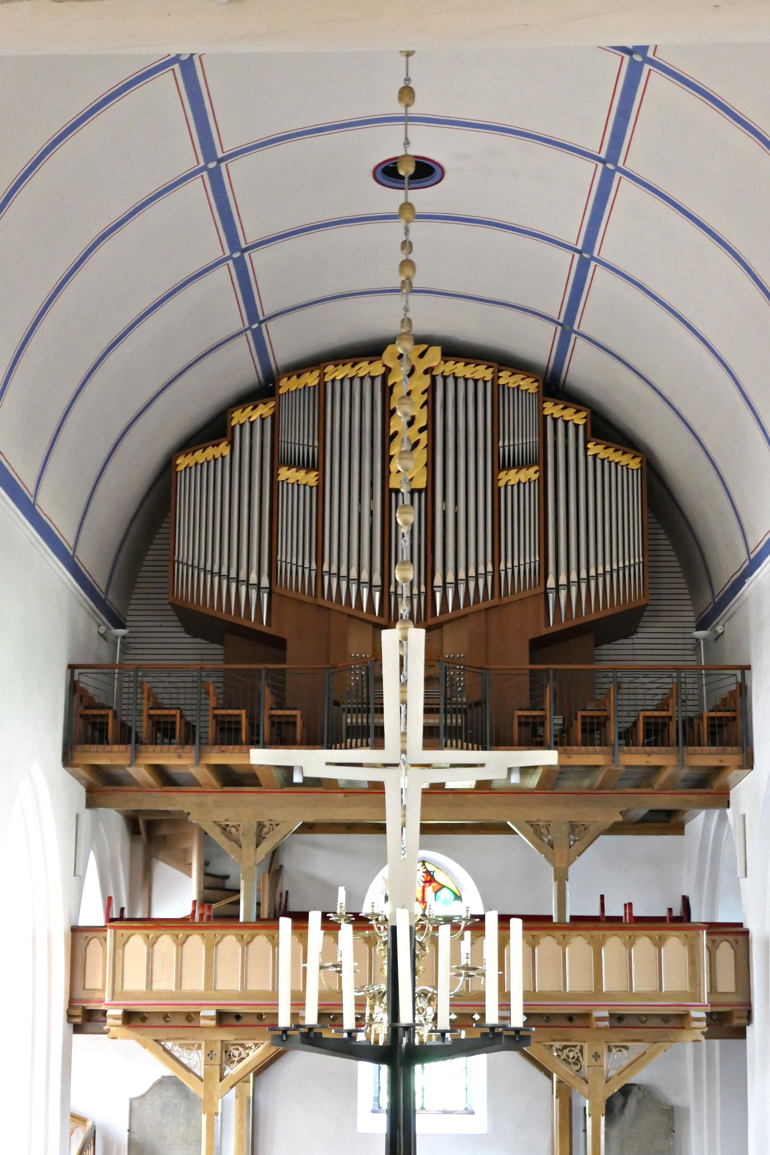 St. Johannis Lüchow, Landkreis Lüchow-Dannenberg, Niedersachsen, Deutschland